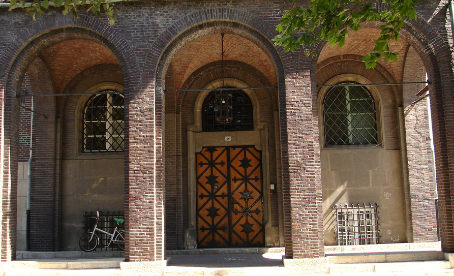 A szegedi püspöki palota kapudíszei